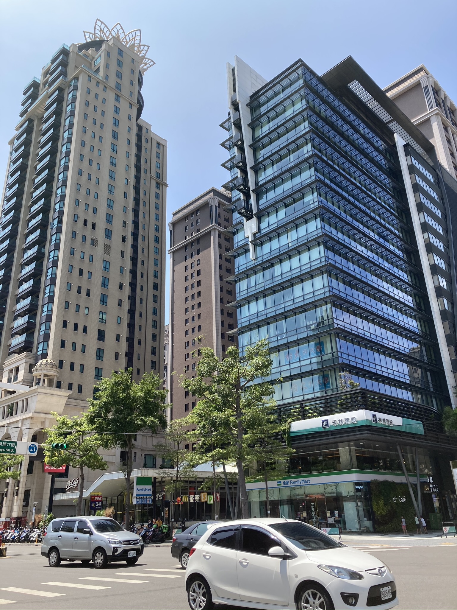 中文（台灣）: 桃園藝文特區